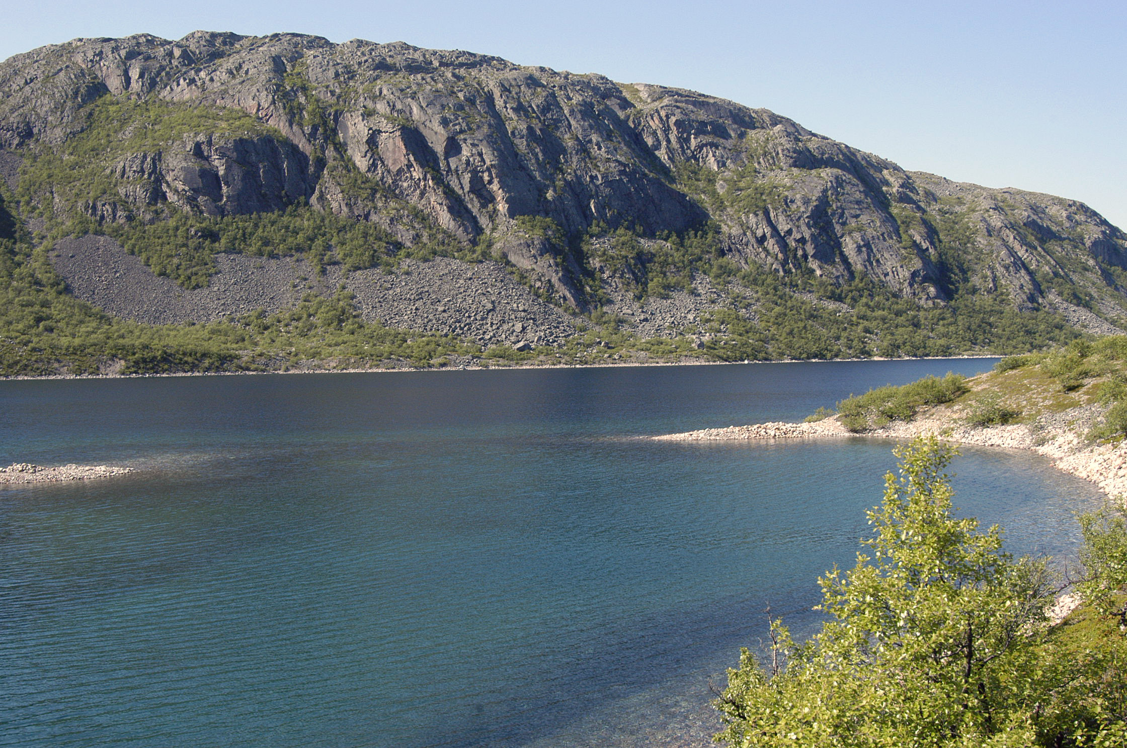 Lake Gánddajávri in Nesseby, Norway